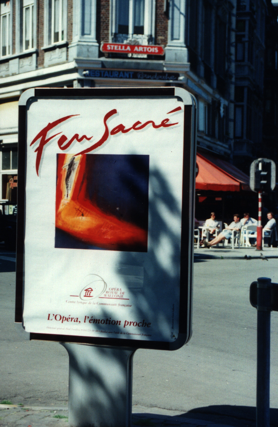 Feu sacré